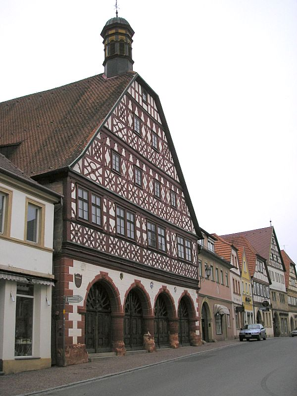 Ebern (Unterfranken). Das Rathaus.